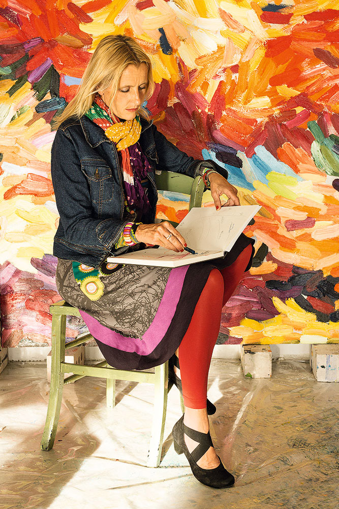 Ursula Jüngst im Atelier 2015